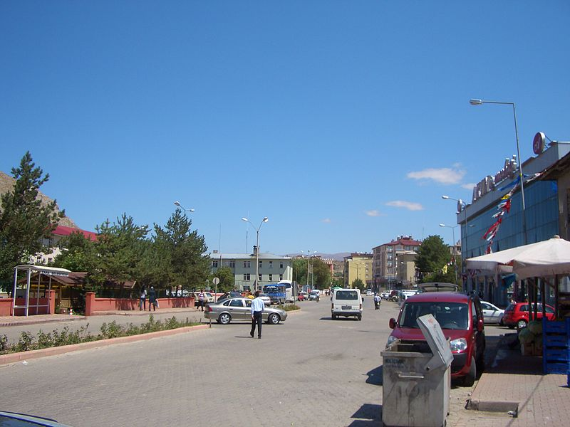 Zara, Sivas Turkey.